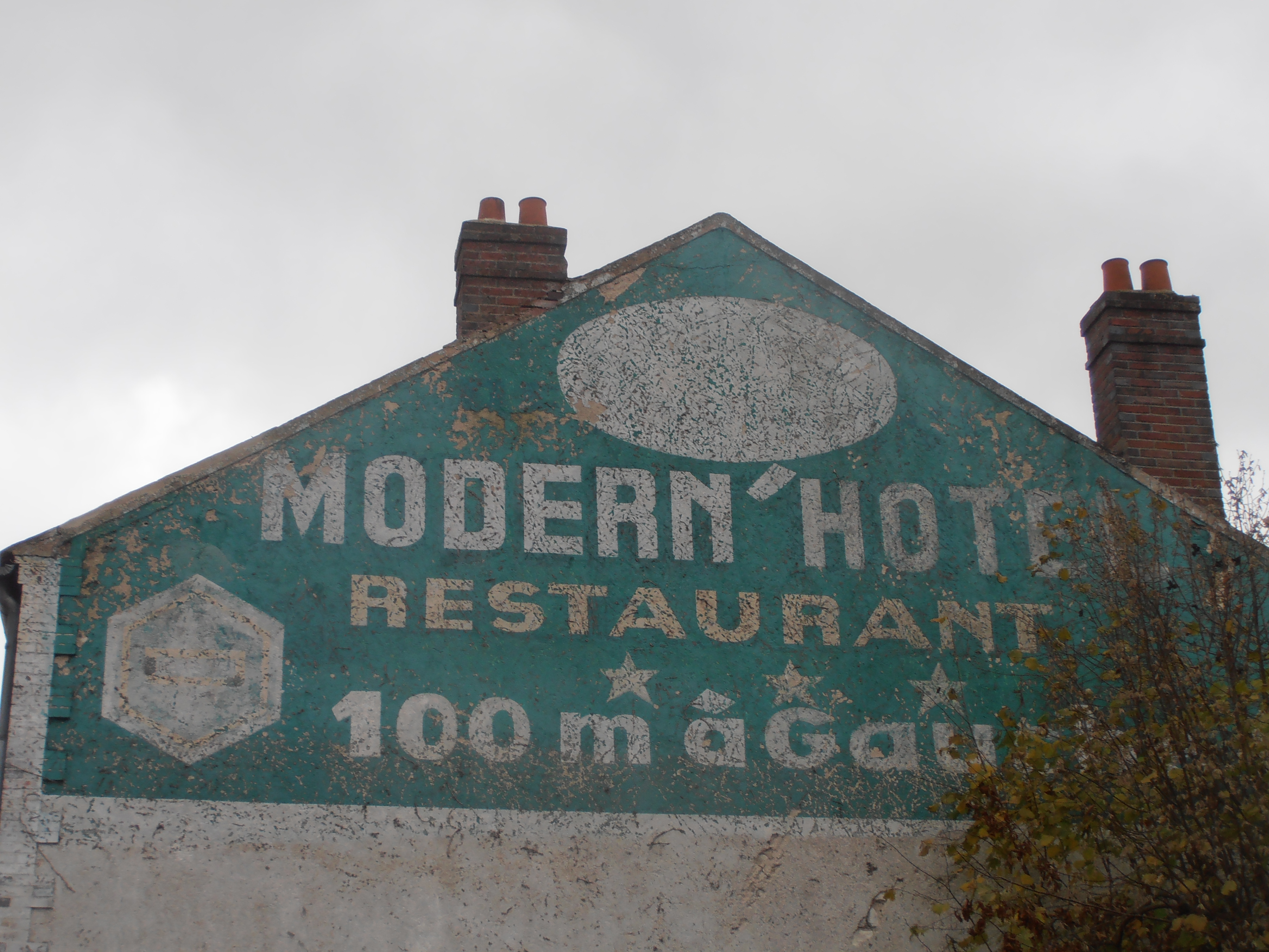 Il s'agit d'une Publicité murale à Joigny (France) comme il y en avait sur la nationale 7